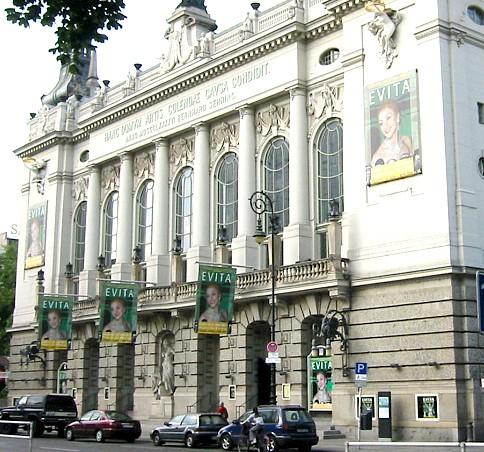 Presentación del musical Evita en Berlín. Berlin Theater des Westens Sep 2002